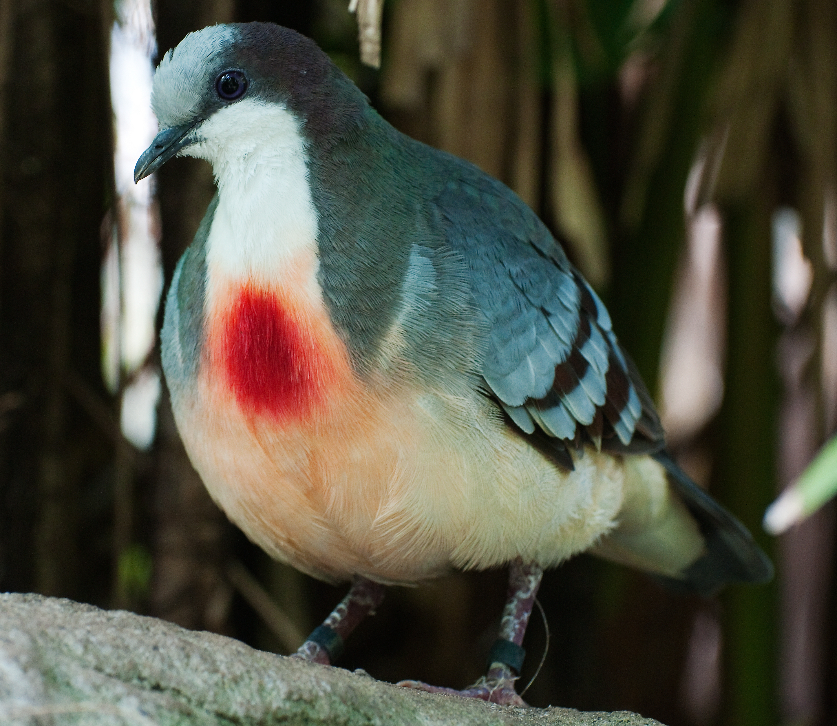 Luzon Bleeding-Heart